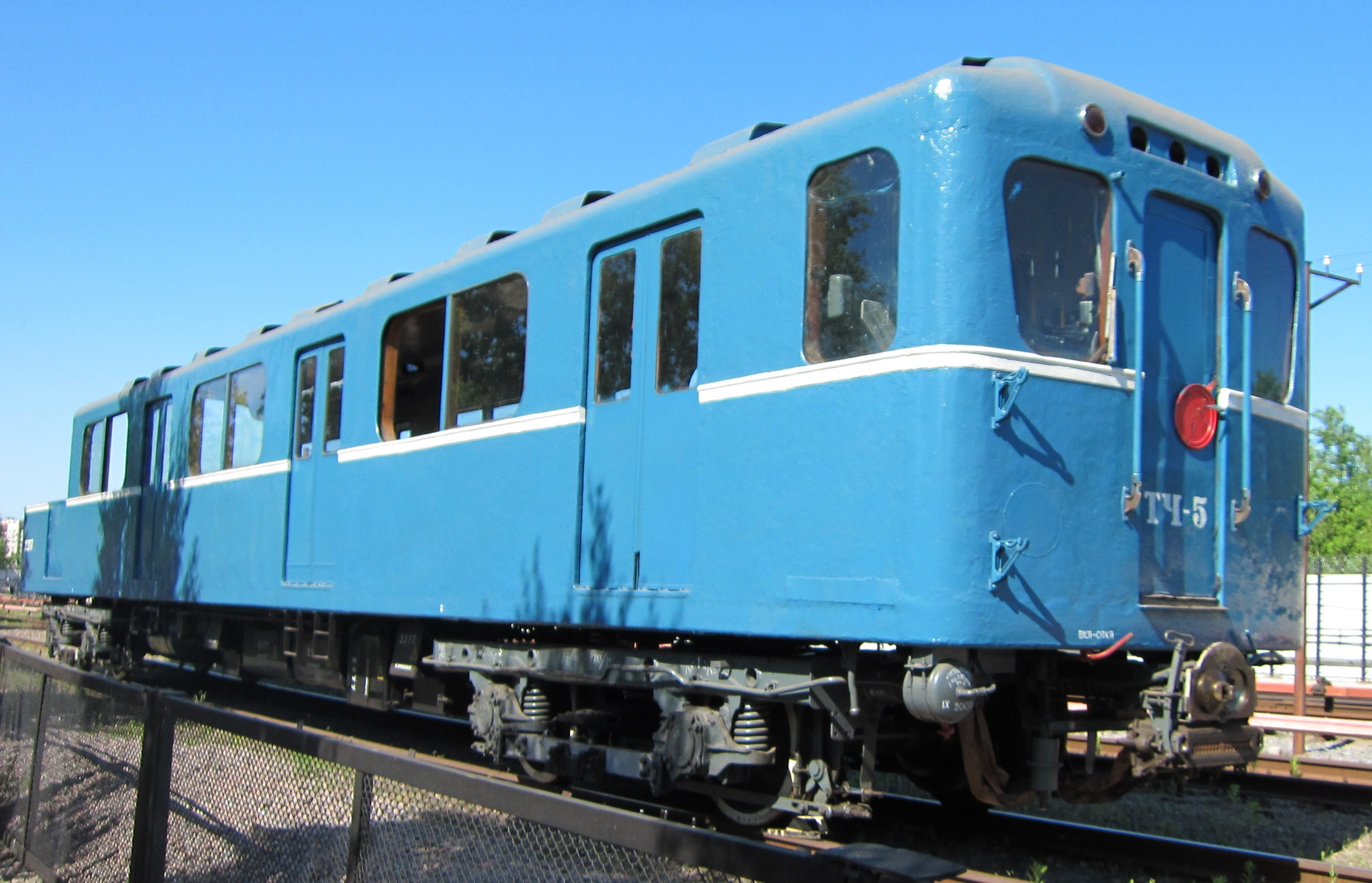 Вагон метро типа Д № 2277